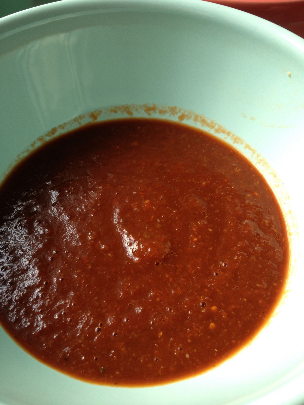 salsa de chile de arbol